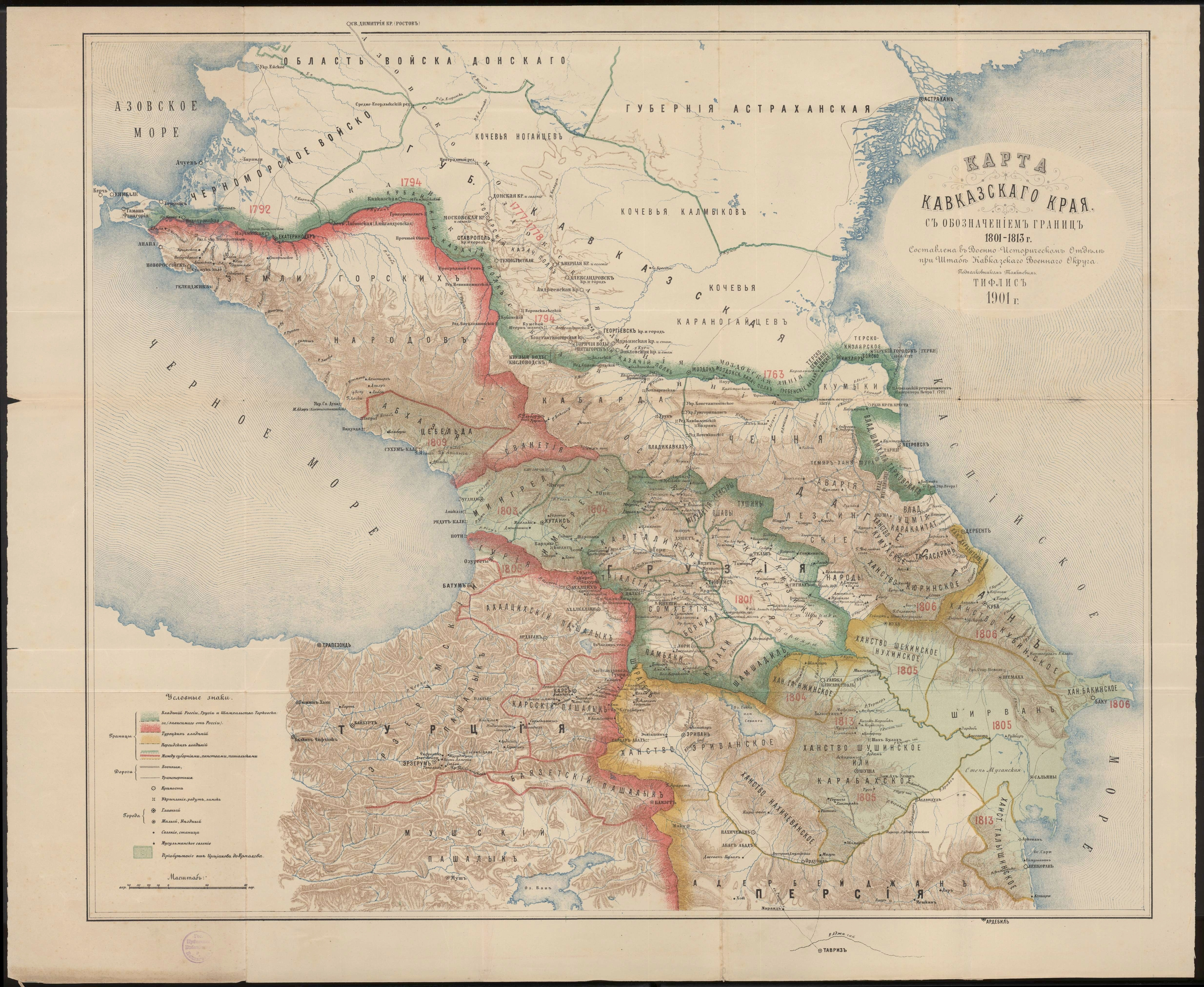 Карта Кавказского края с обозначением границ 1801-1813 г. Составлена в военно-историческом отделе при штабе Кавказского военного округа подполковником Томкиевым. Тифлис 1901 г.